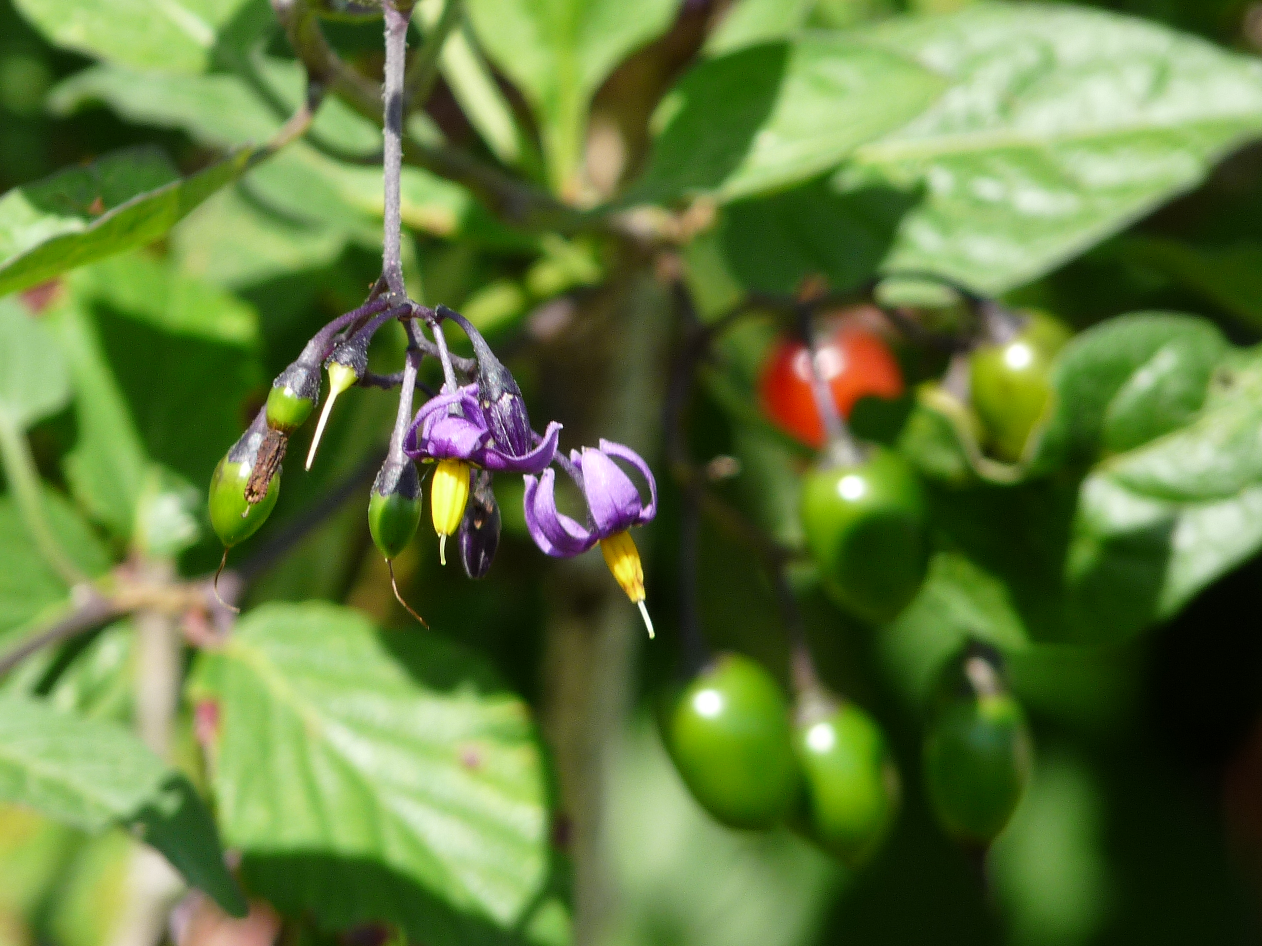 Pría - Flor